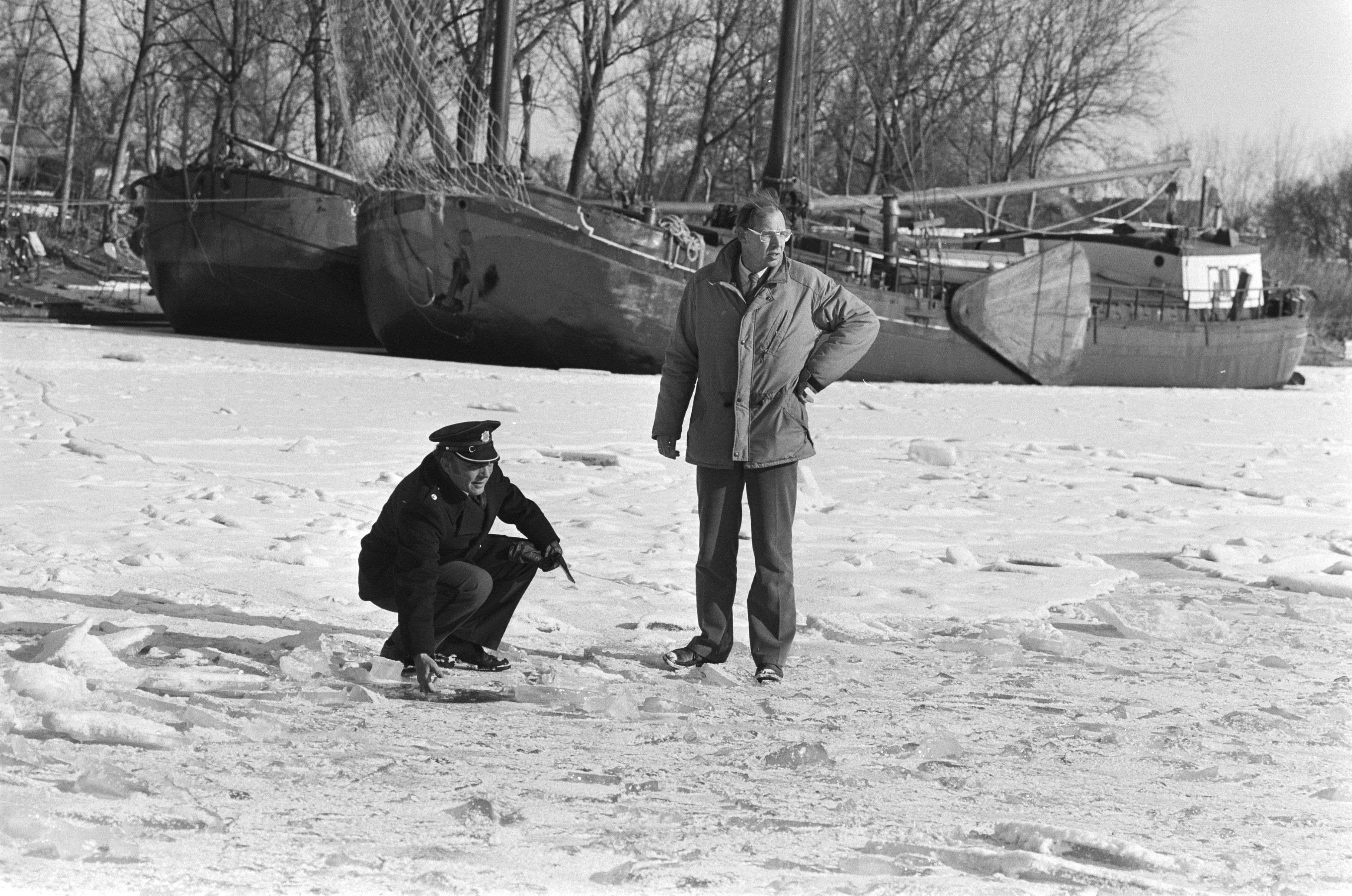 Collectie / Archief : Fotocollectie Anefo Reportage / Serie : Elfstedentocht 1986 Beschrijving : Voorbereiding 14e Elfstedentocht. IJsmeester Kroes (rechts naast de ijsveger) inspecteert het ijs bij Harlingen Datum : 24 februari 1986 Locatie : Friesland, Harlingen Trefwoorden : ijs, kou, marathonschaatsen, winter Persoonsnaam : Kroes, Henk Fotograaf : Bogaerts, Rob / Anefo, [onbekend] Auteursrechthebbende : Nationaal Archief Materiaalsoort : Negatief (zwart/wit) Nummer archiefinventaris : bekijk toegang 2.24.01.05 Bestanddeelnummer : 933-5774